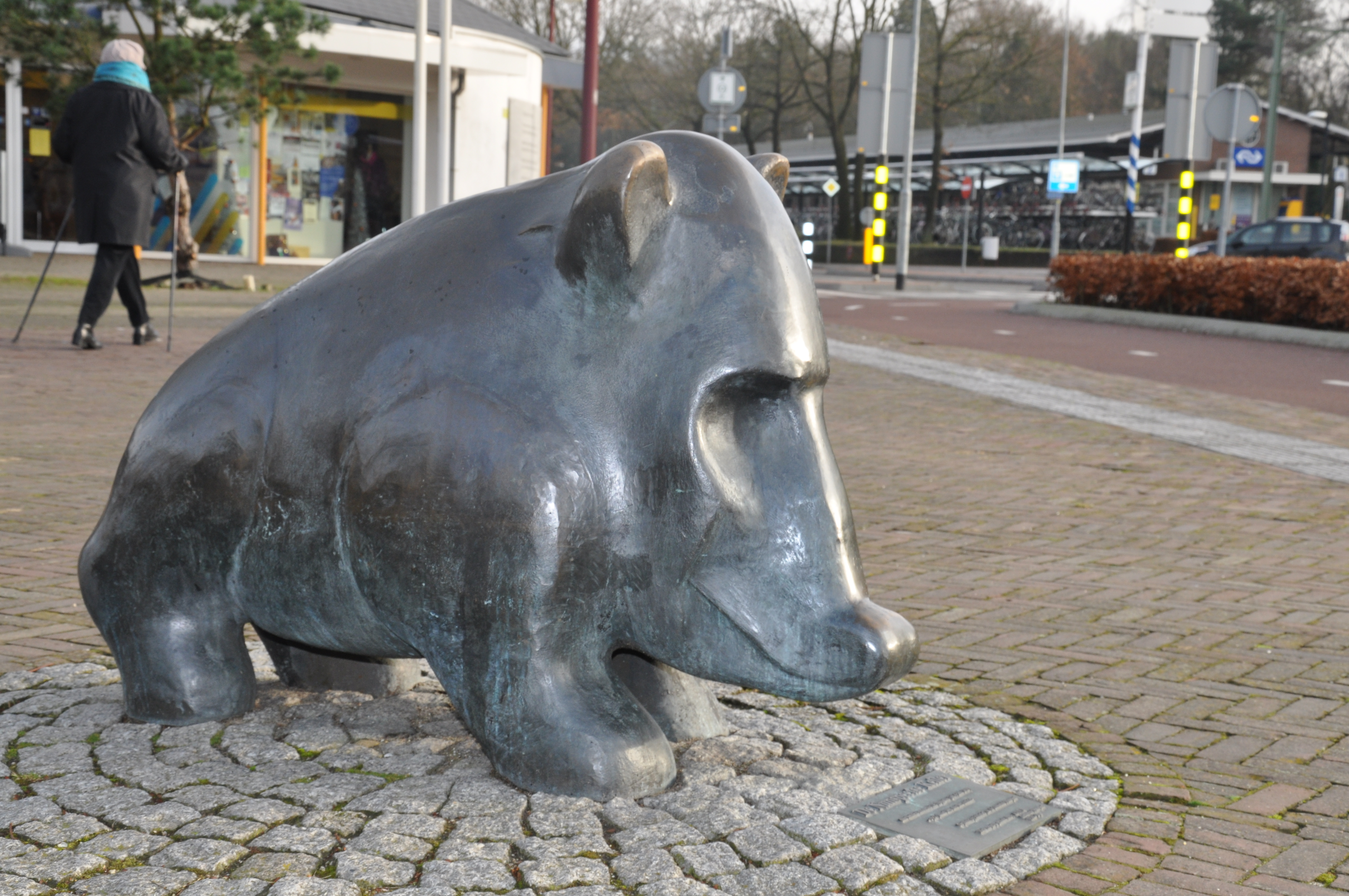 Keiler